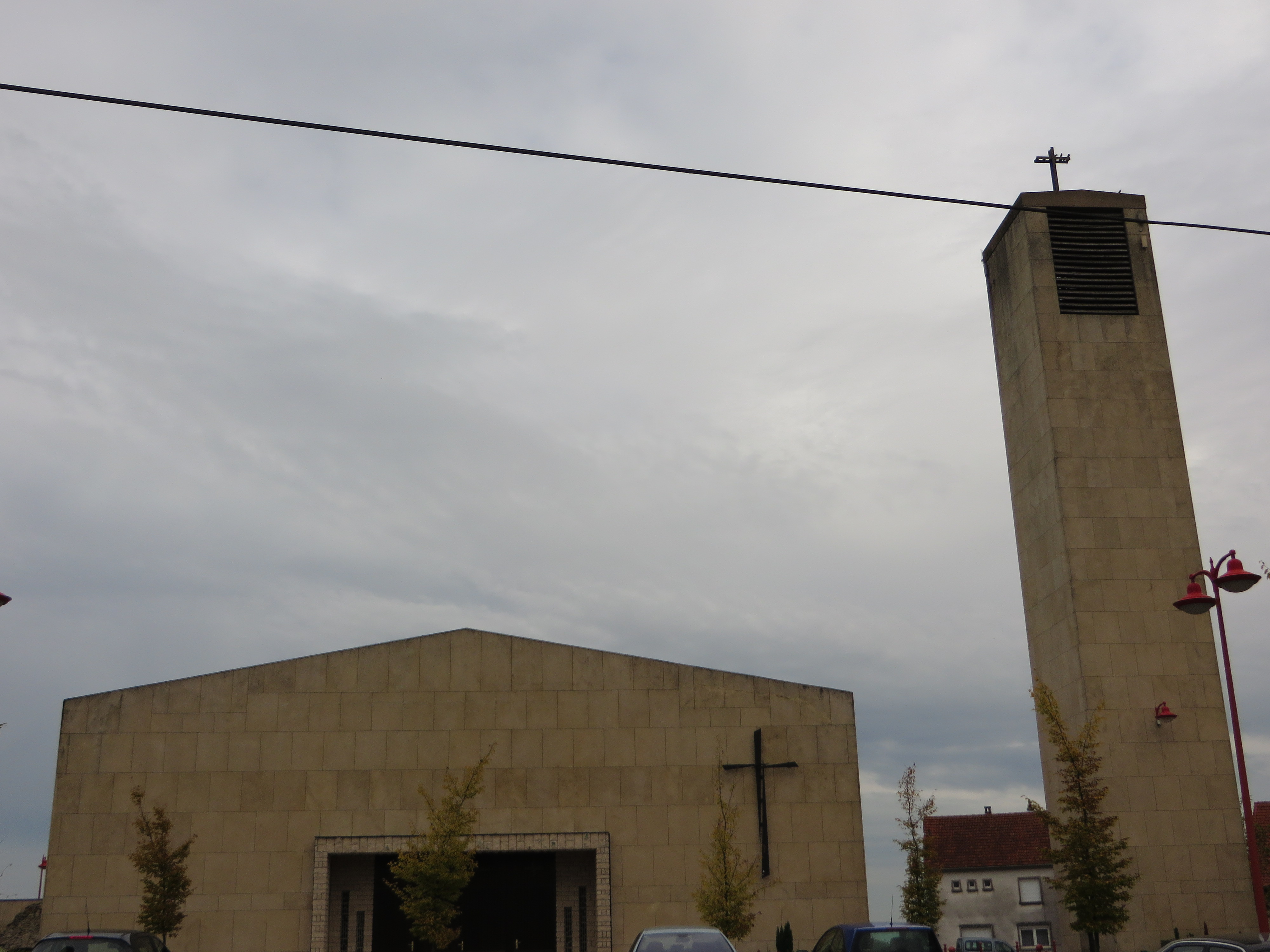 Francaltroff eglise